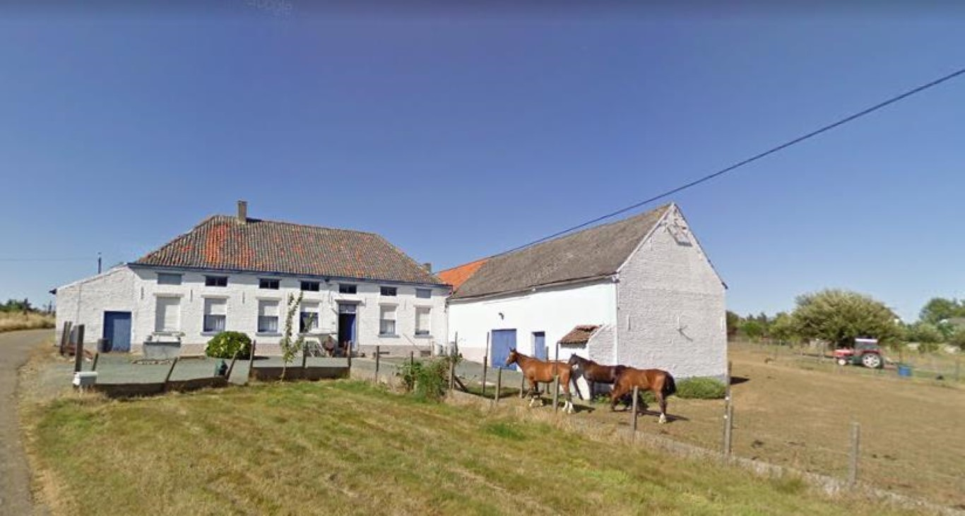 De Kattemmolen: Molenhuis